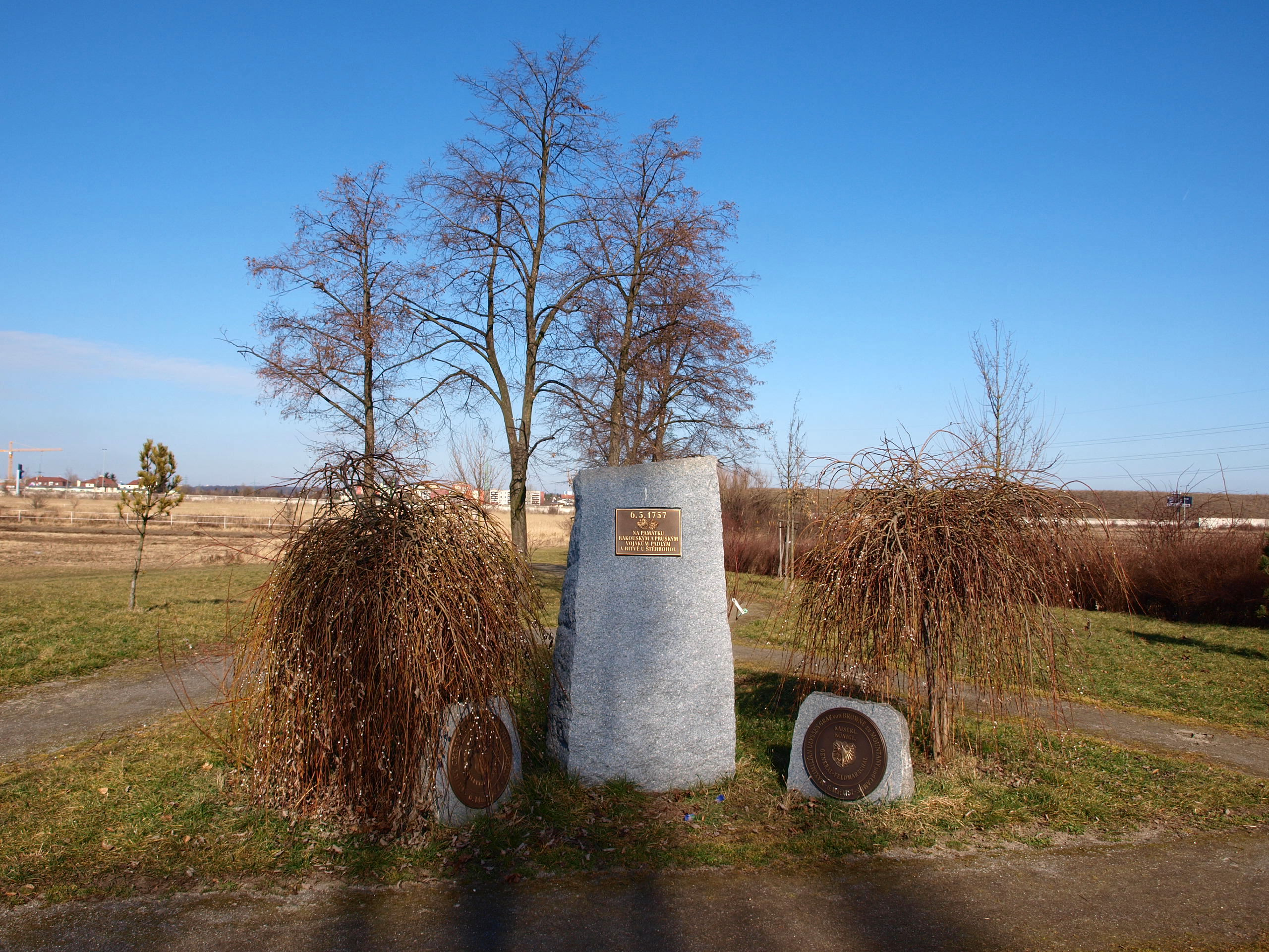 Štěrboholy Pamětní deska